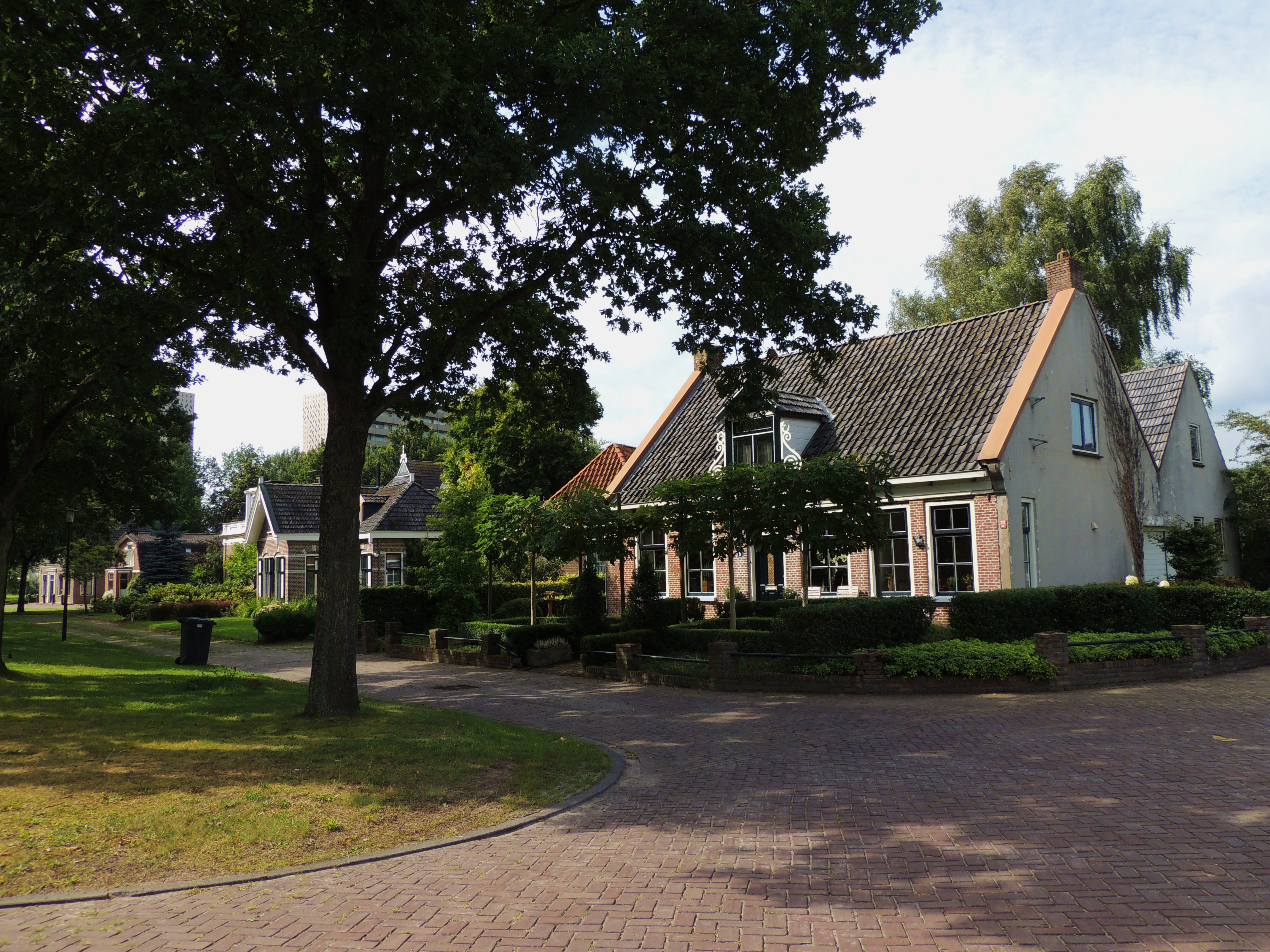 Ureterper Verlaat. Drachten